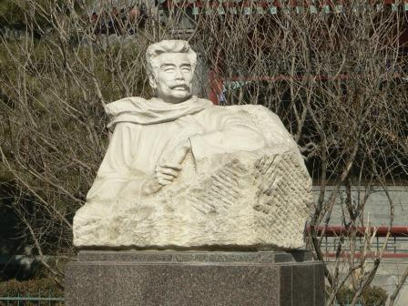 鲁迅雕像 用心阁2005年2月26日拍摄于北京鲁迅博物馆